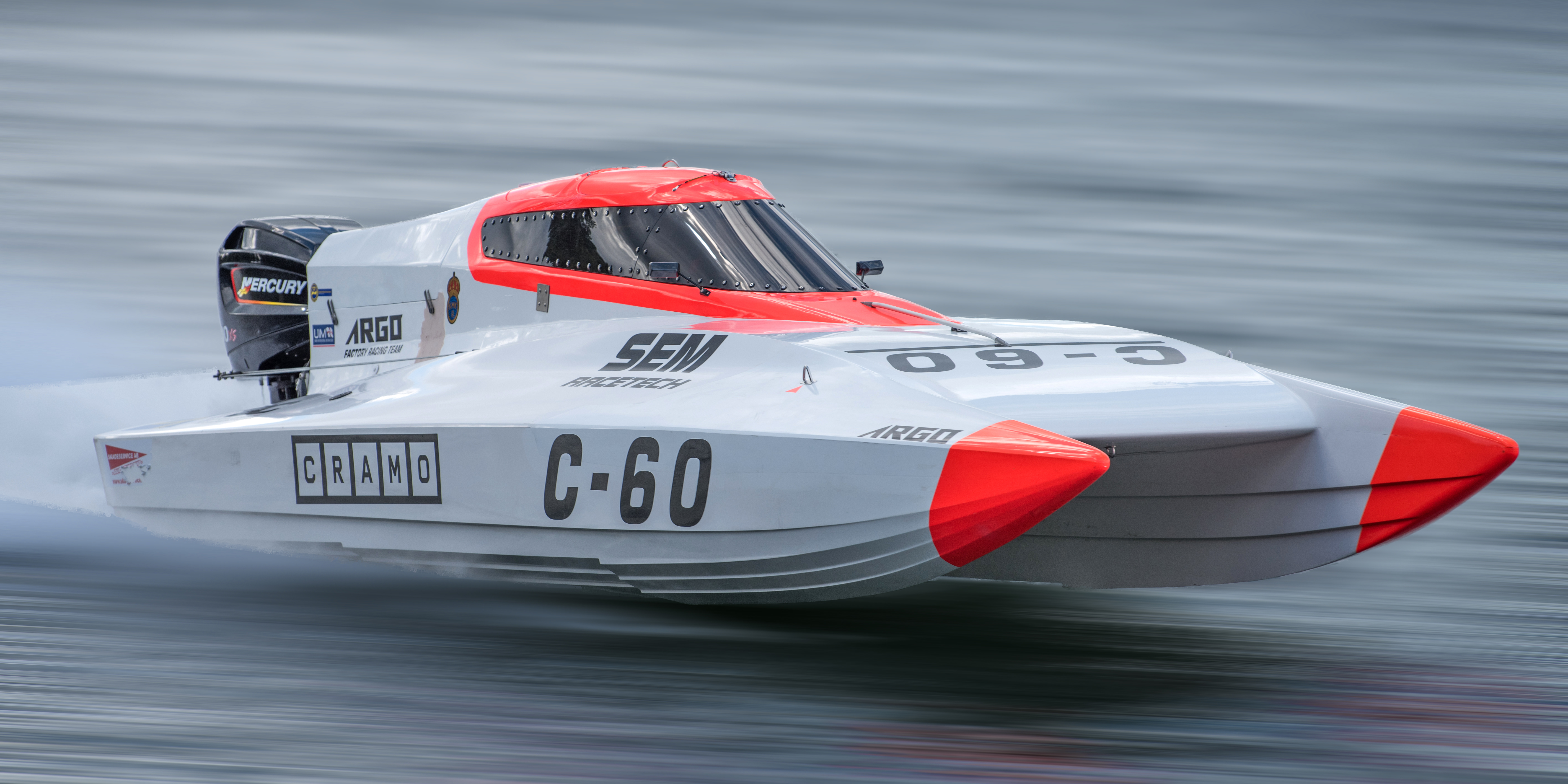 Roslagsloppet 2017 Roslagsloppet 2017